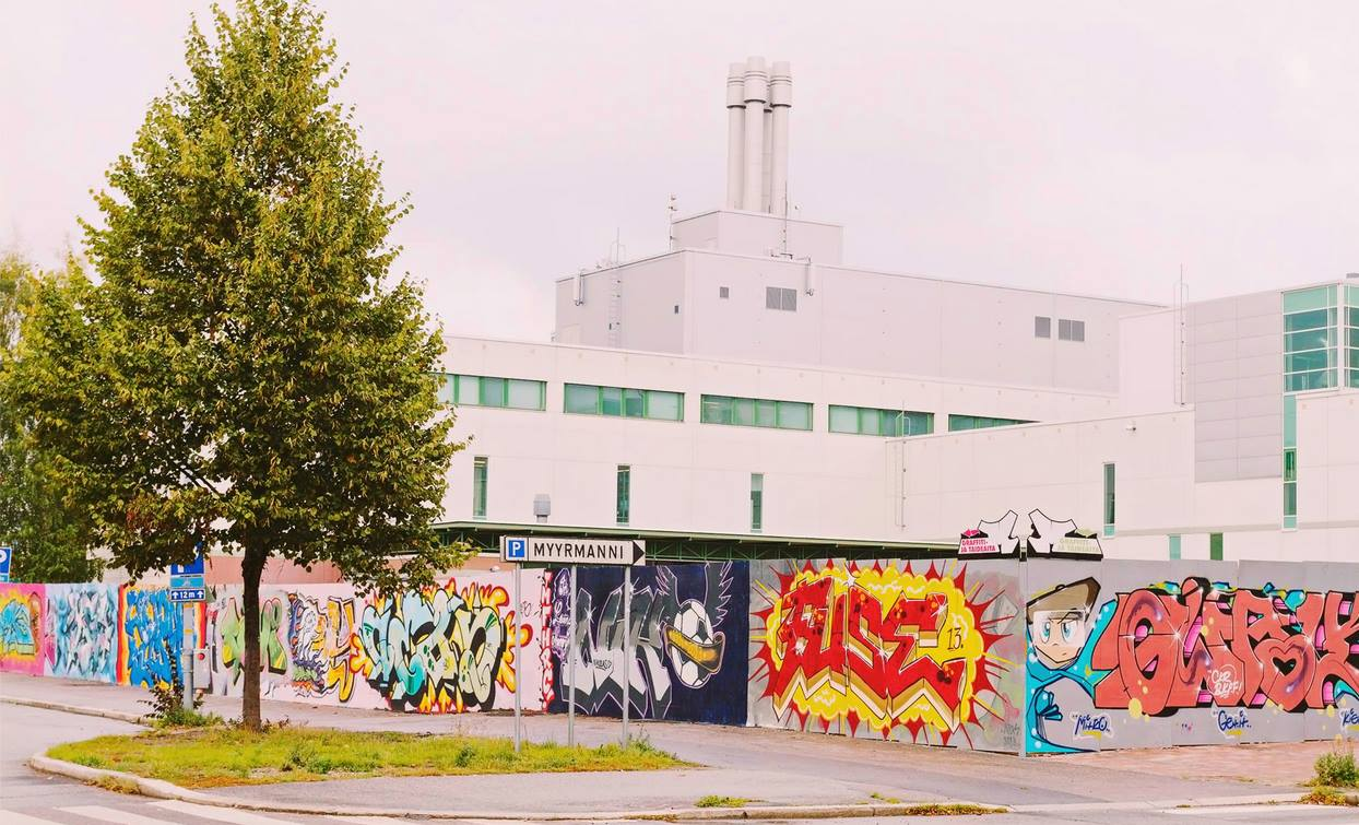 Myyrmäe avoin graffitiseinä Myyrmäen montun ympärillä